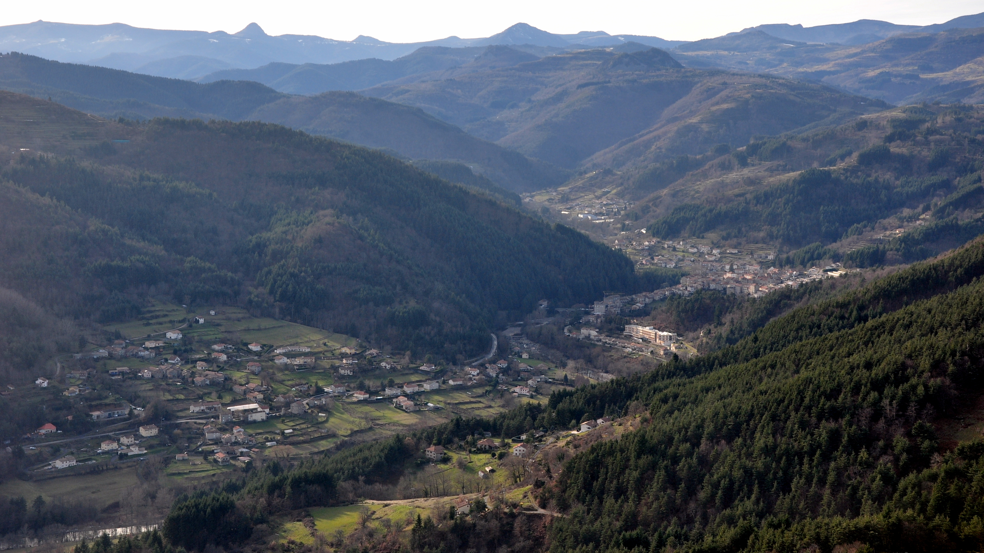 Saint-Martin-de-Valamas depuis le Château de Rochebonne